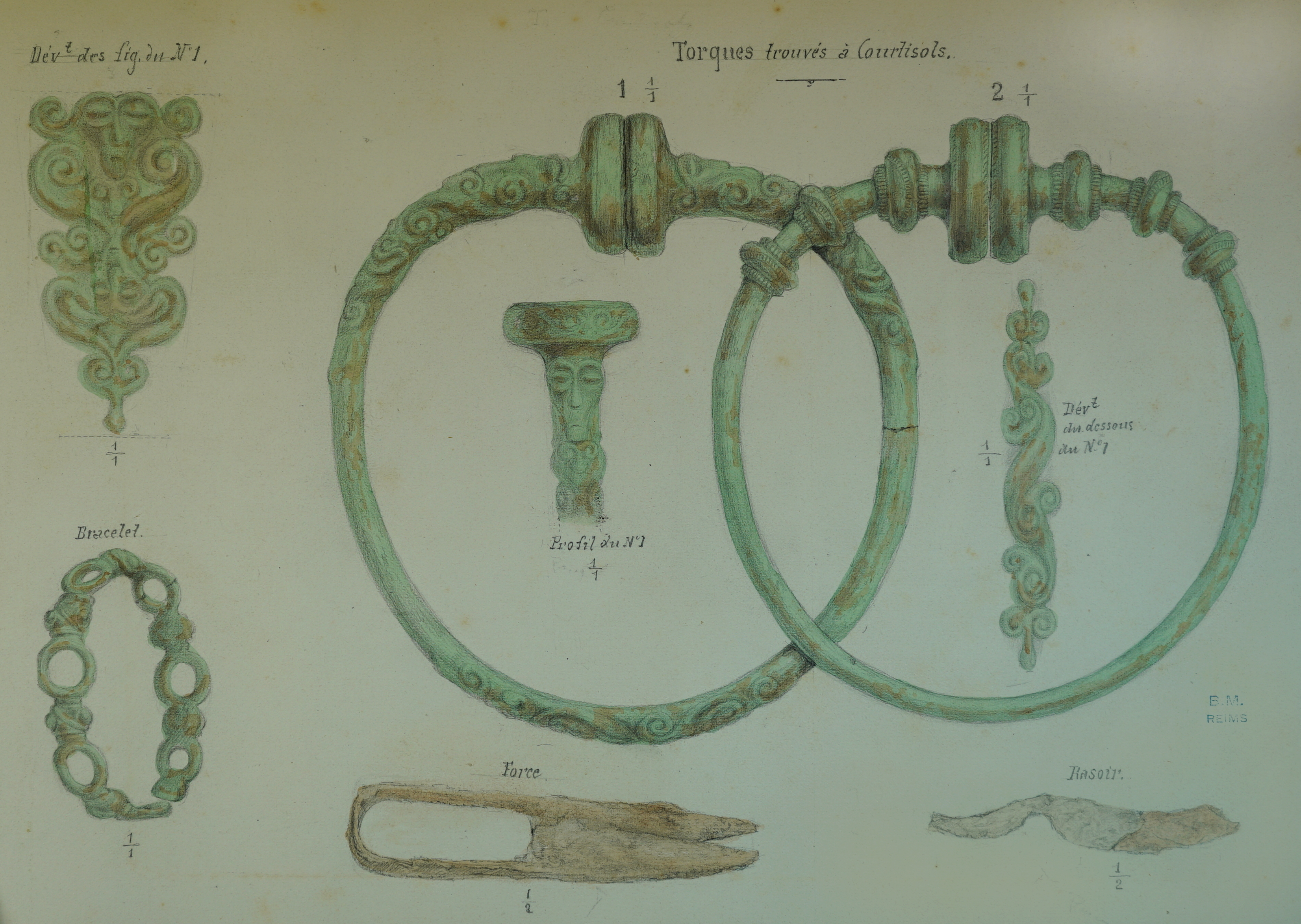 onzième fosse au lieu-dit "les closeaux de la conche", in "la champagne souterraine" par Morel.